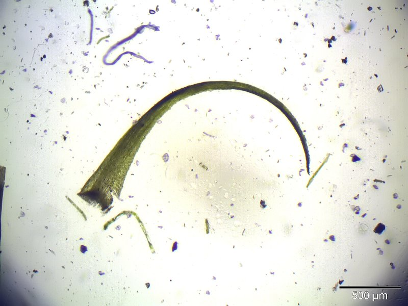 Einseitswendiges Kleingabelzahnmoos Dicranella heteromalla, Blatt, 40x